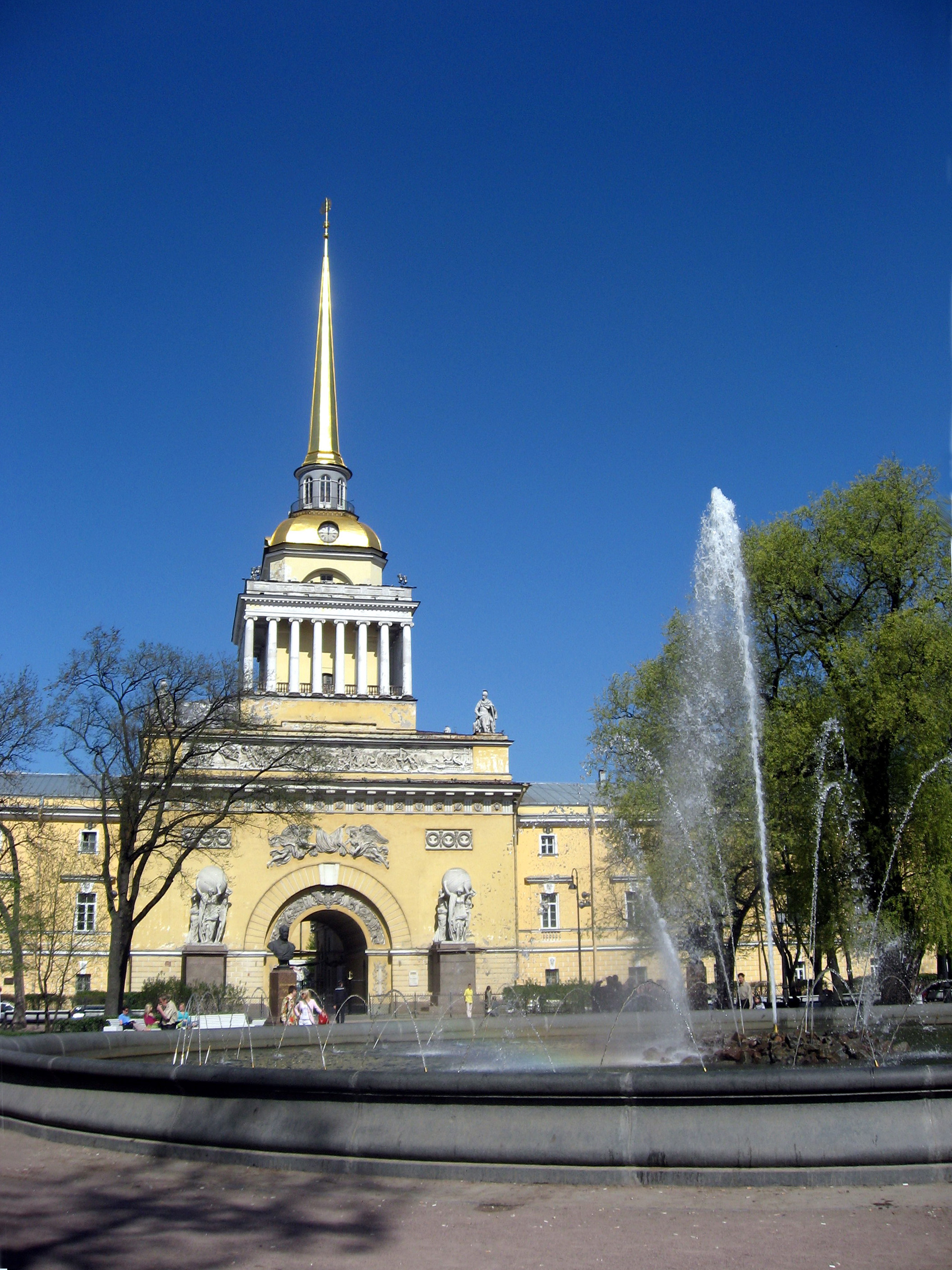 Sankt-Petěrburg